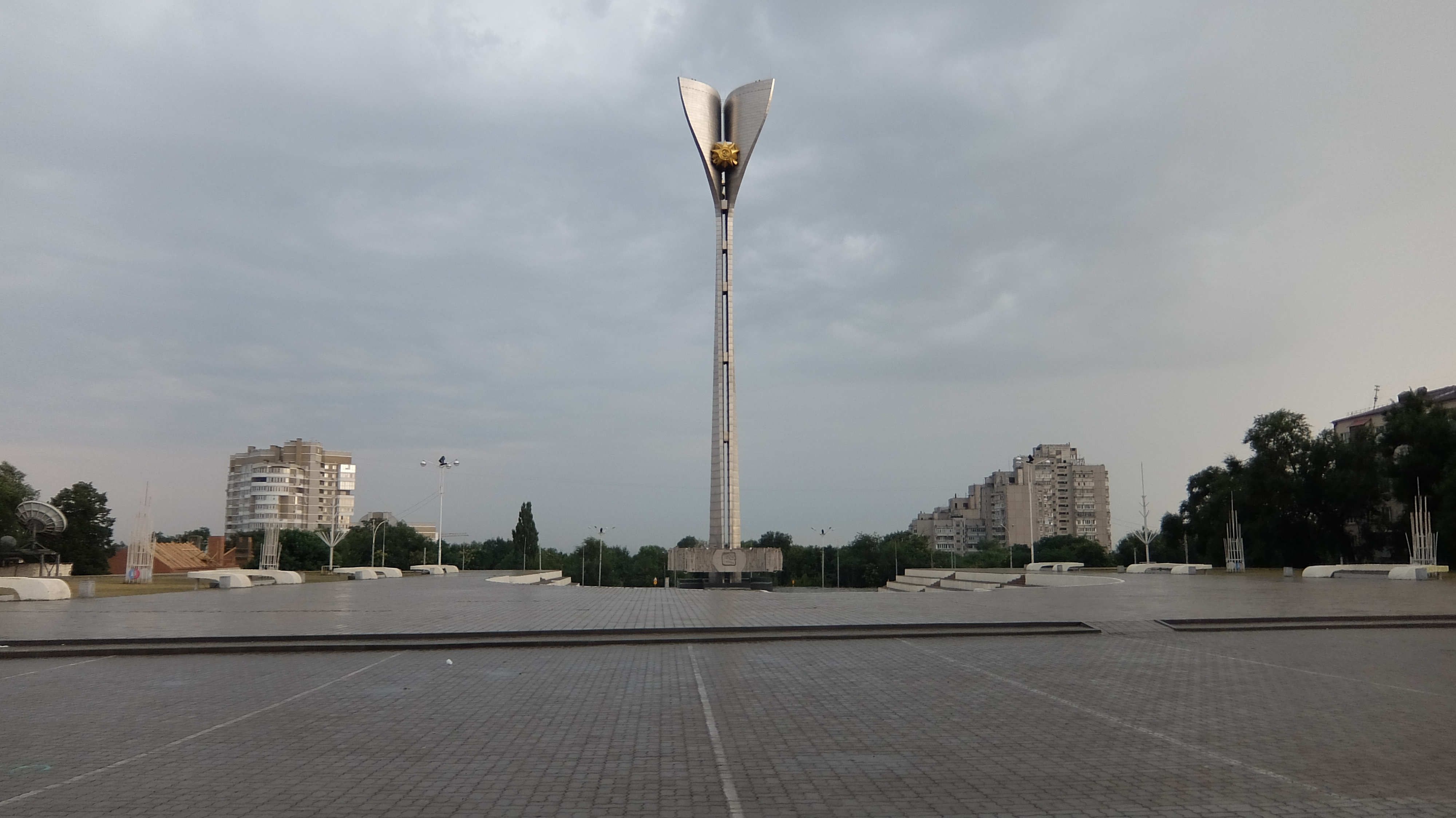 Памятник Воинам-освободителям города Ростова-на Дону погибшим от немецко-фашистских захватчиков в 1941-1943 гг.: площадь Театральная, Ростов-на-Дону, Ростовская область